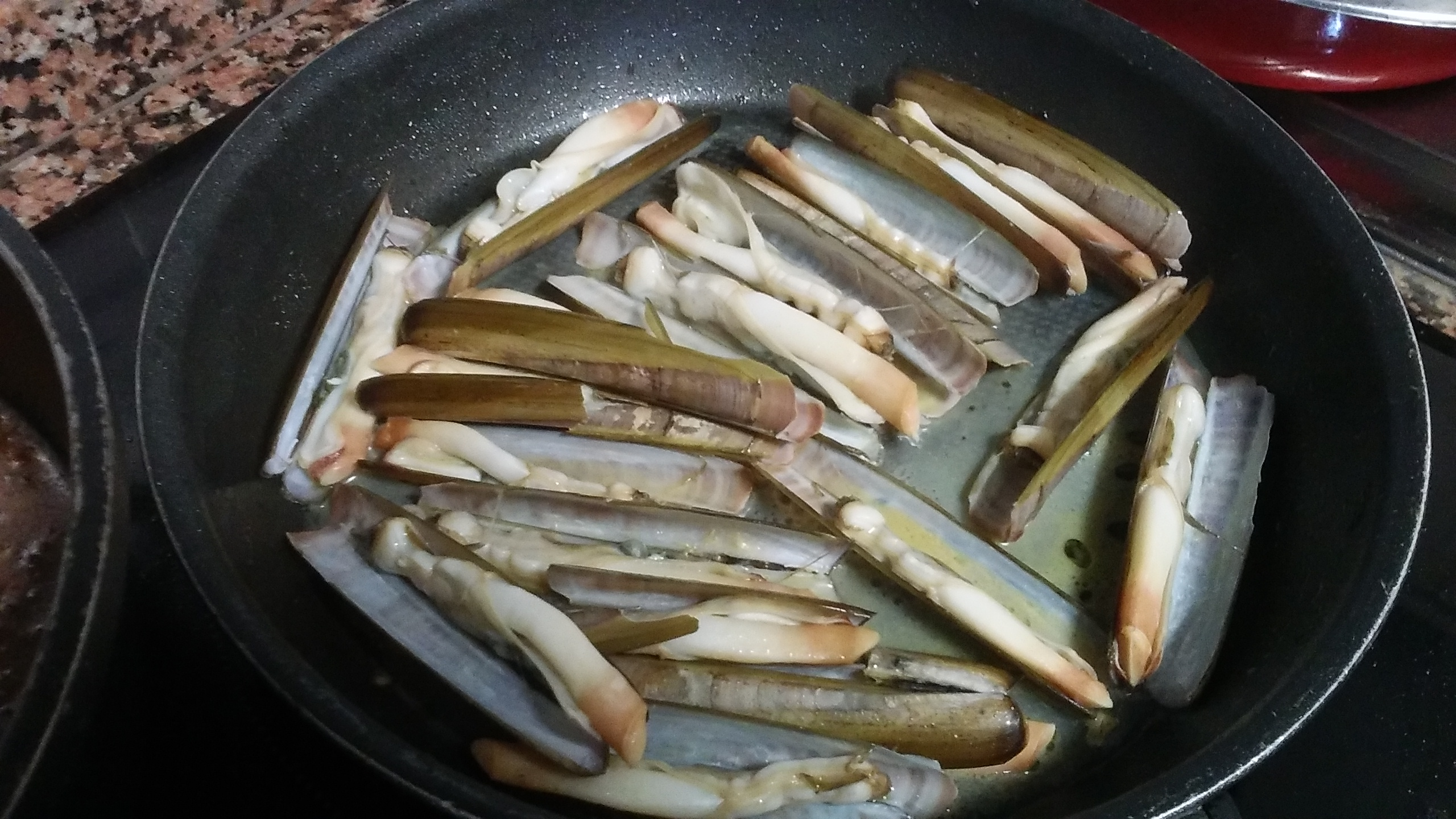 cocinando navajas